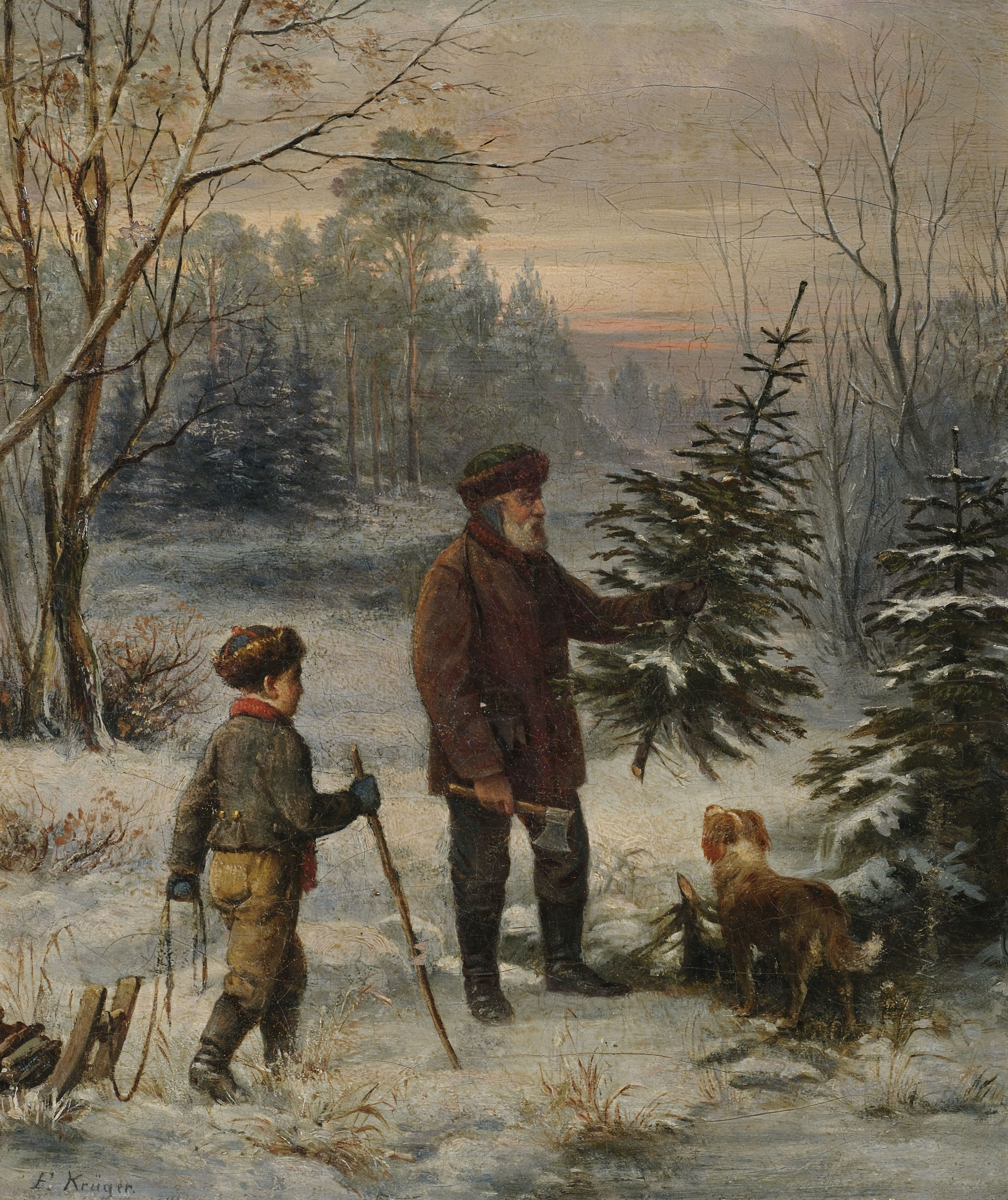 Vorweihnacht. Vater und Sohn schlagen im Winterwald einen Christbaum. Öl auf Leinwand, unten links signiert. 41 x 35 cm